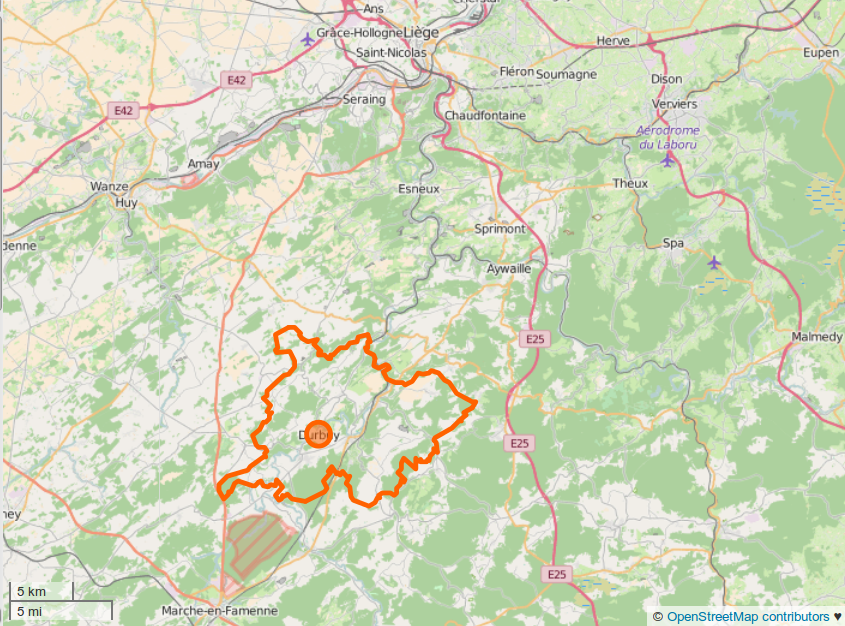 Limites communales de Durbuy (Belgique) et situation de la ville, OSM. This map may be incomplete, and may contain errors. Don't rely solely on it for navigation.